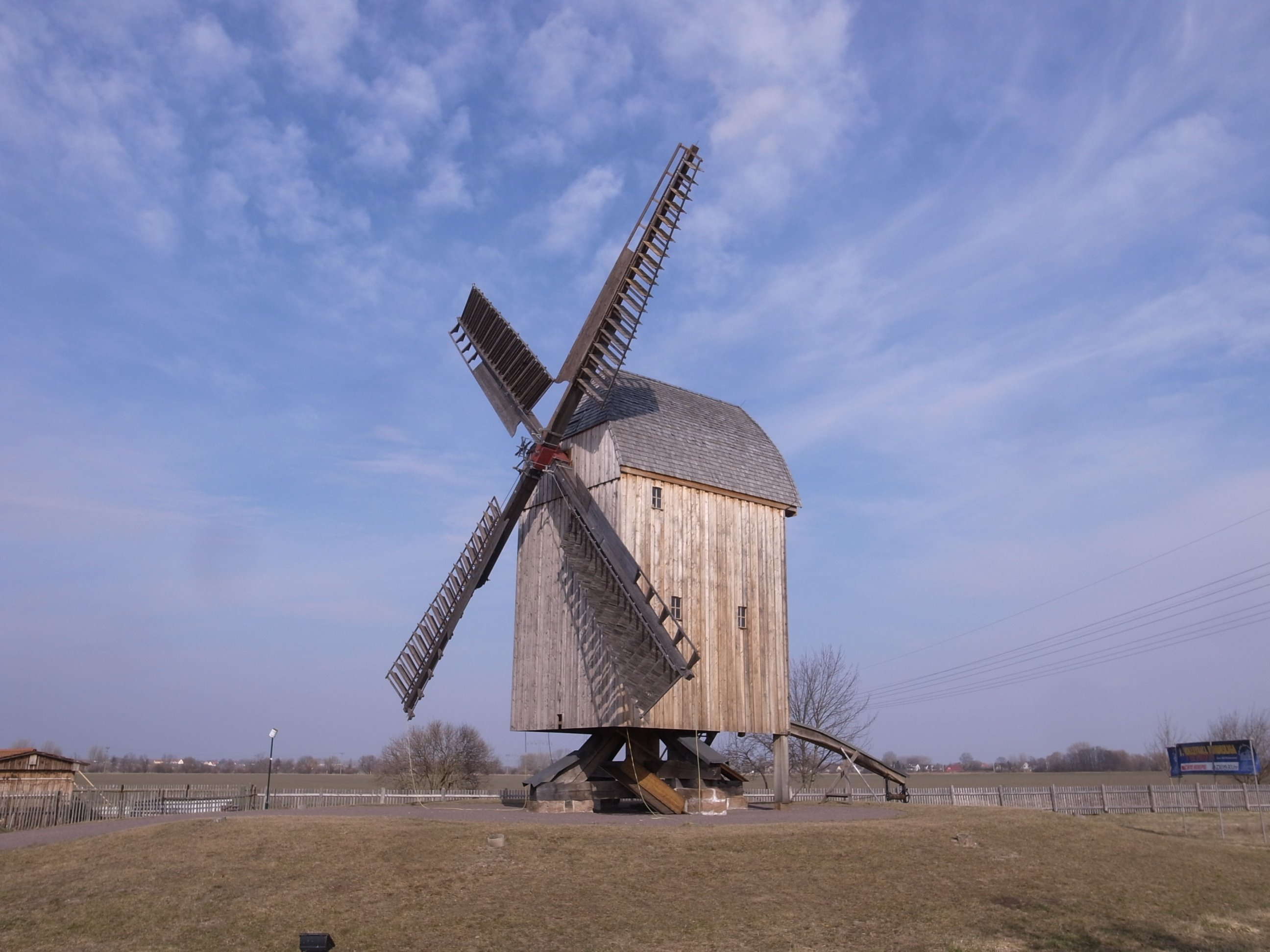 Spergau,Windmühle